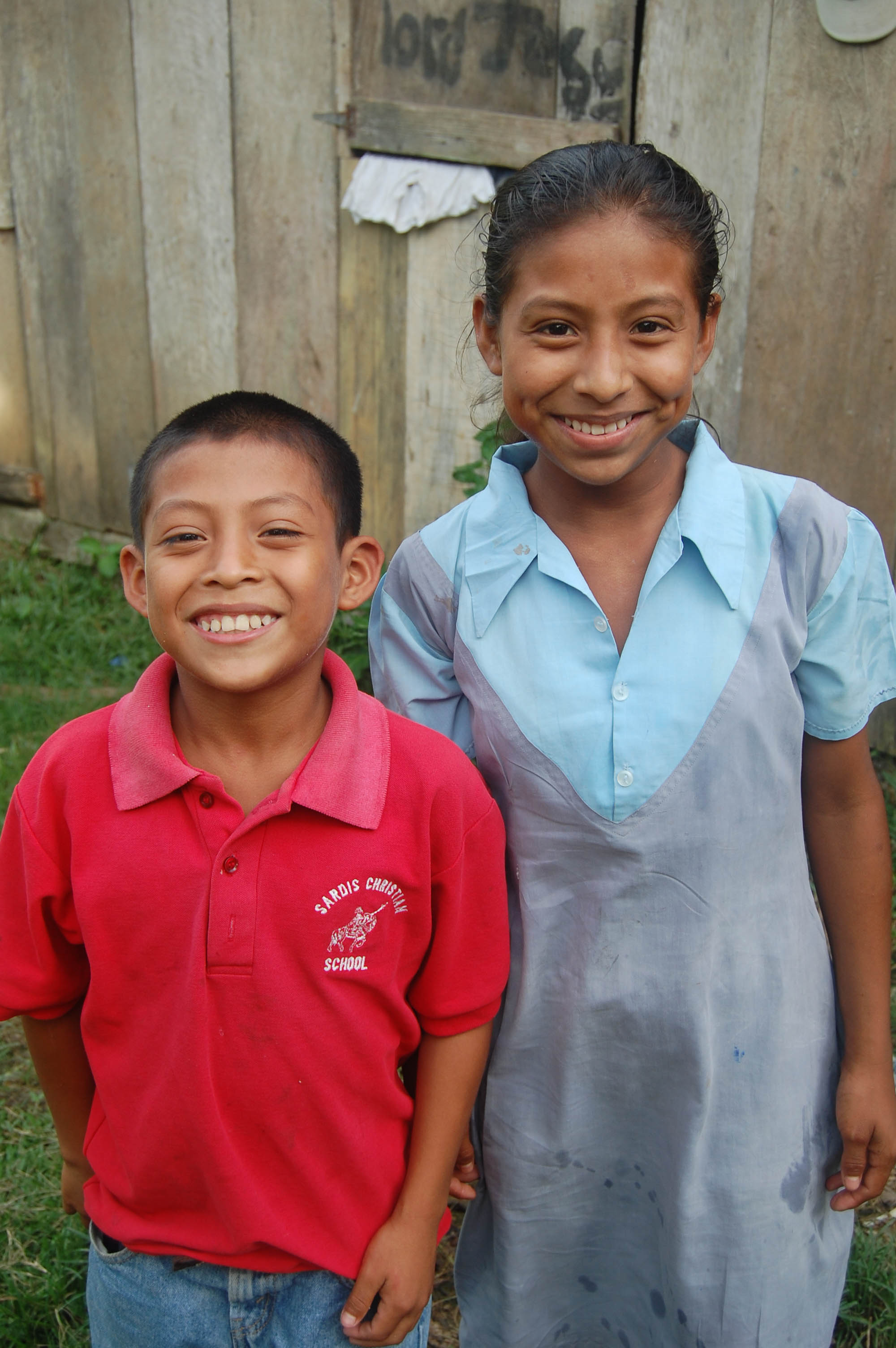 Rita Chiqui